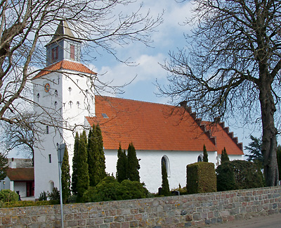 Saksild Kirke Hads Herred, Århus Amt, Denmark